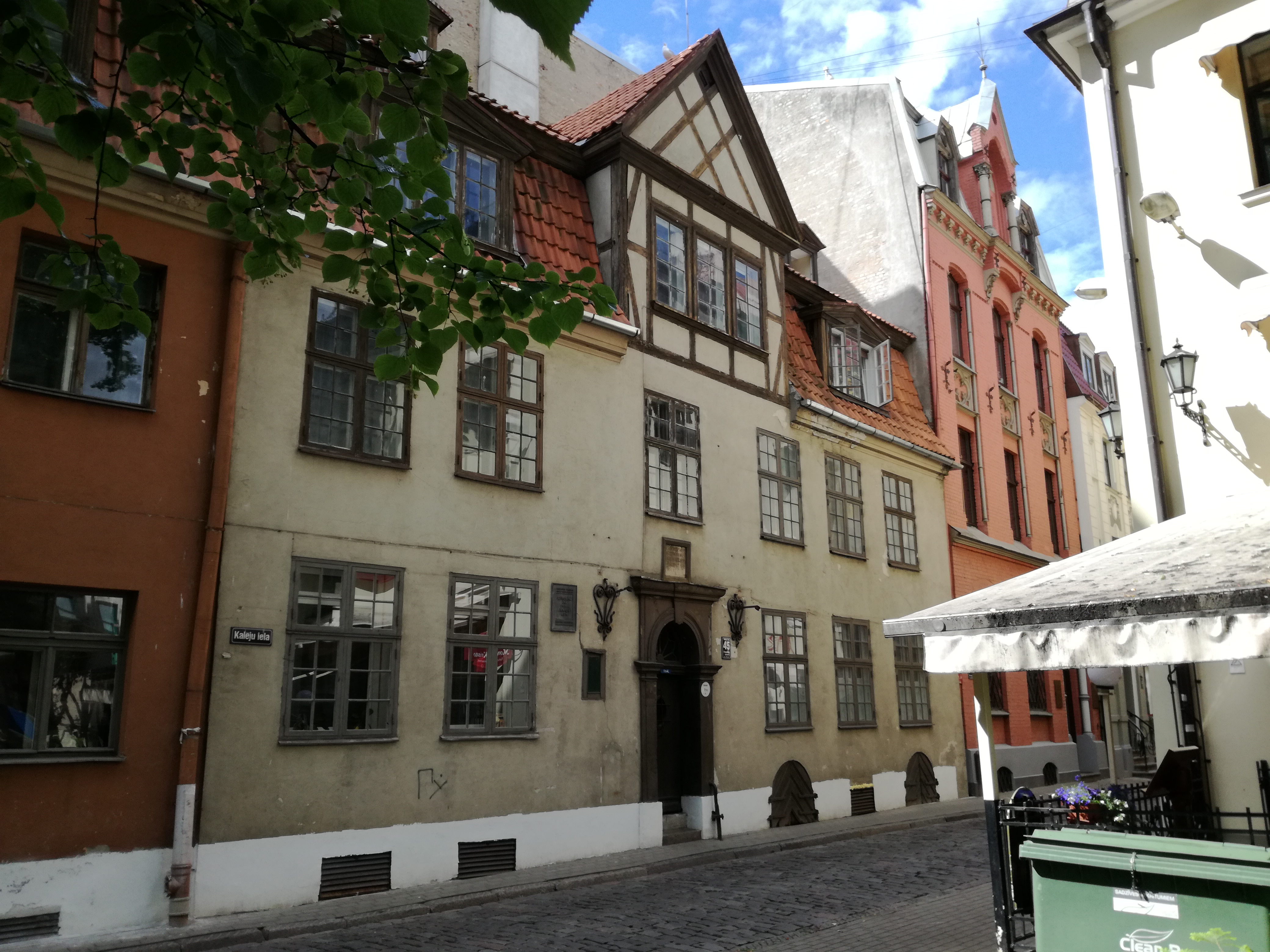 Вецрига